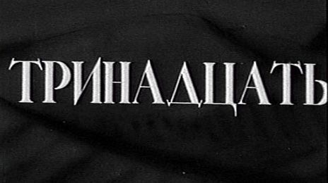 Титры фильма «Тринадцать» (СССР, 1936)